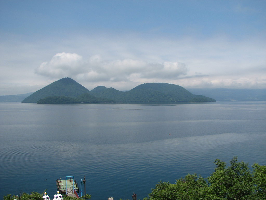 洞爺湖.